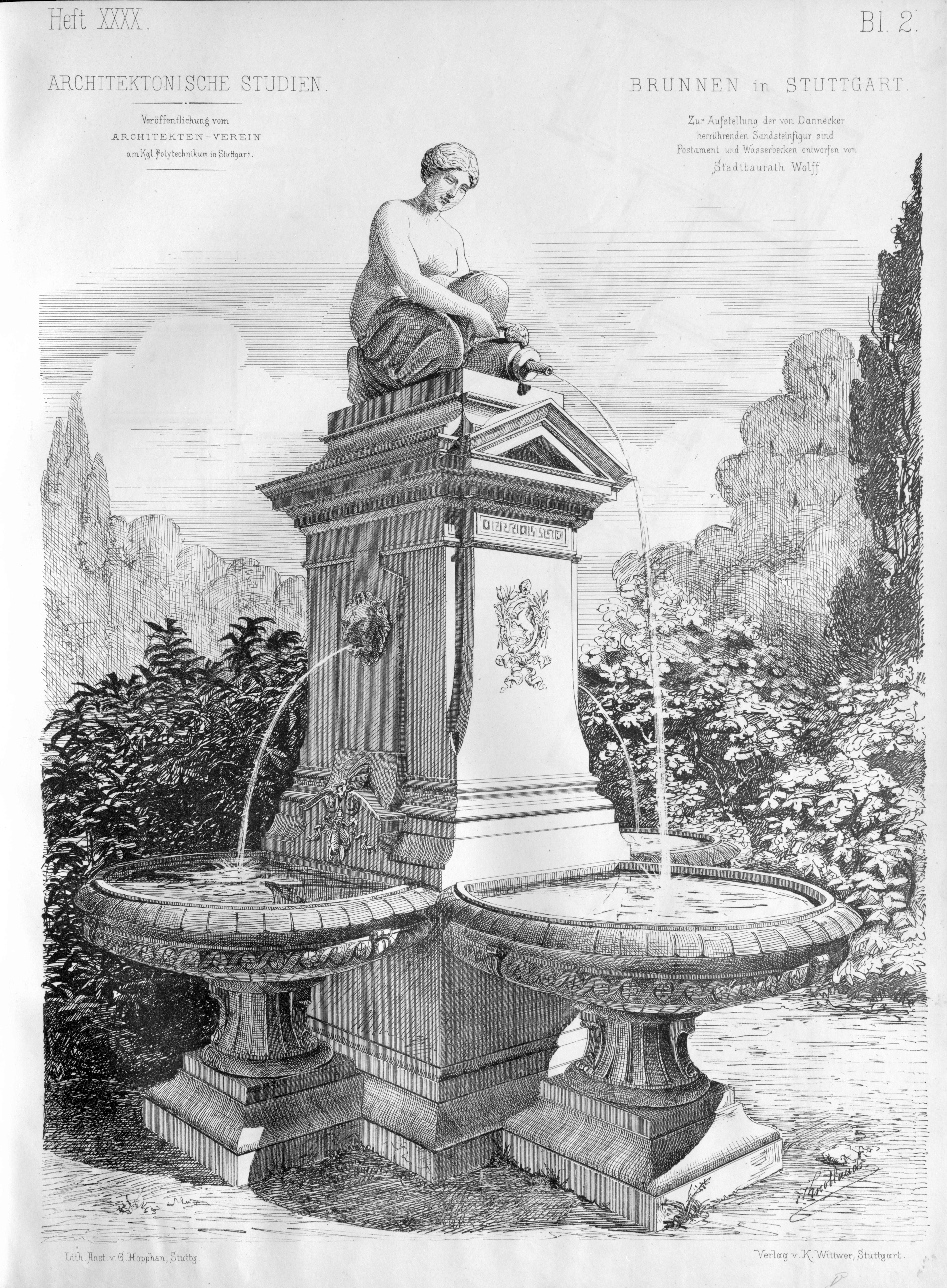 Nymphenbrunnen am Neckartor in Stuttgart mit der Figur einer Quellnymphe oder Brunnennymphe, 1877. Modell: Johann Heinrich Dannecker 1817, Ausführung in Sandstein: Theodor Wagner 1843, Ersatz durch haltbarere Marmorausführung: Theodor Bausch 1888. 1944 wurde der Brunnen zerstört, die Figur der Nymphe wurde in dem Städtischen Lapidarium Stuttgart aufgestellt (Nummer 50). – Ein Brunnen mit einer Kopie der Nymphe befindet sich im Unteren Schlossgarten in Stuttgart, → Foto.